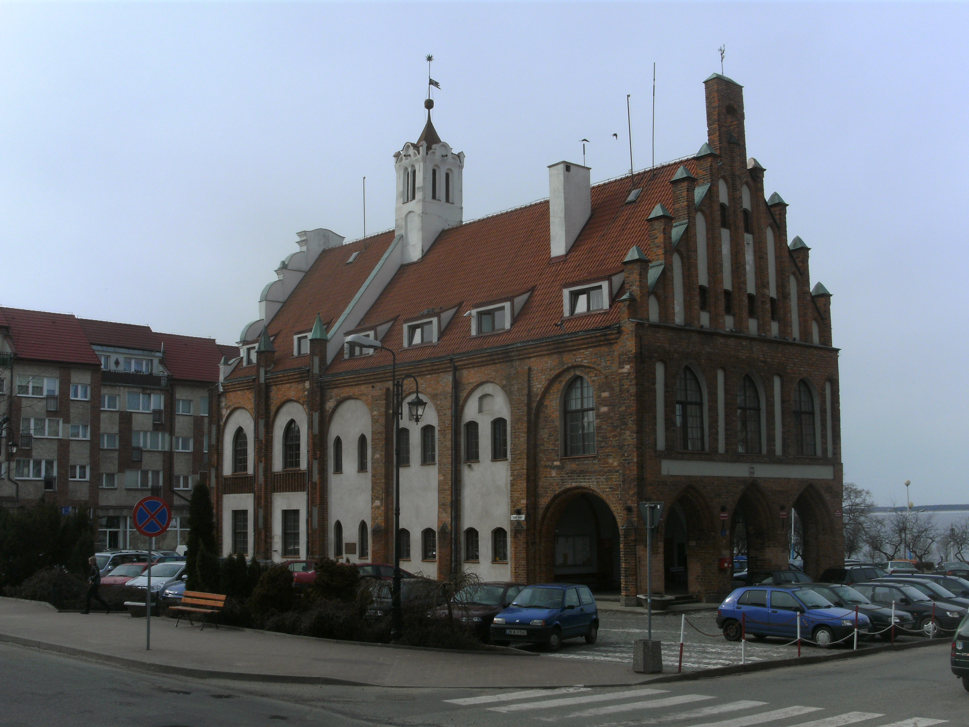 Cammin i. Pom., Vorderansicht des Rathauses